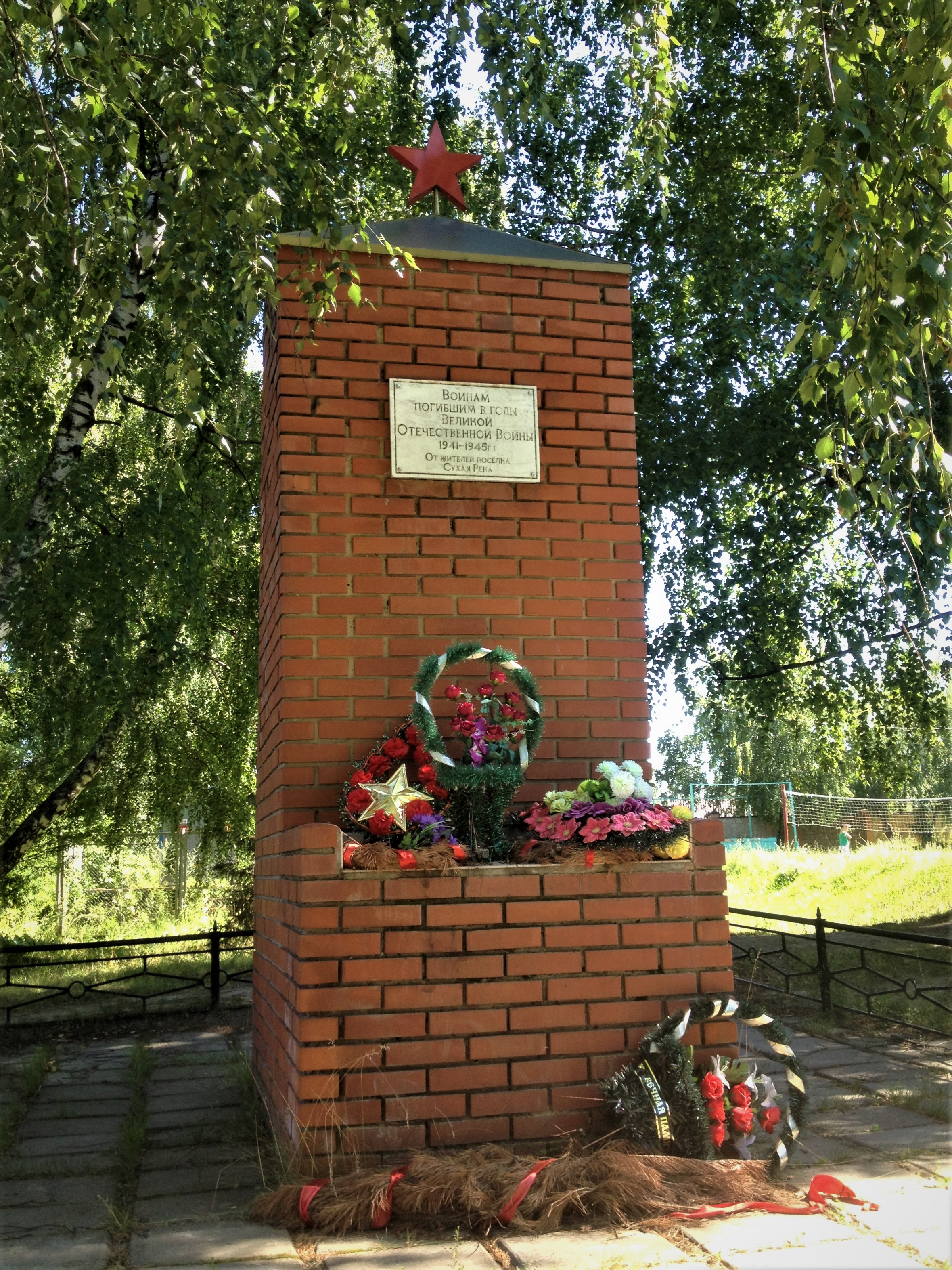 Памятник «Воинам, погибшим в годы Великой Отечественной Войны 1941 — 1945 гг. От жителей посёлка Сухая Река» (г. Казань, посёлок Сухая Река,пересечение улиц Большая Заречная и Малая Заречная).